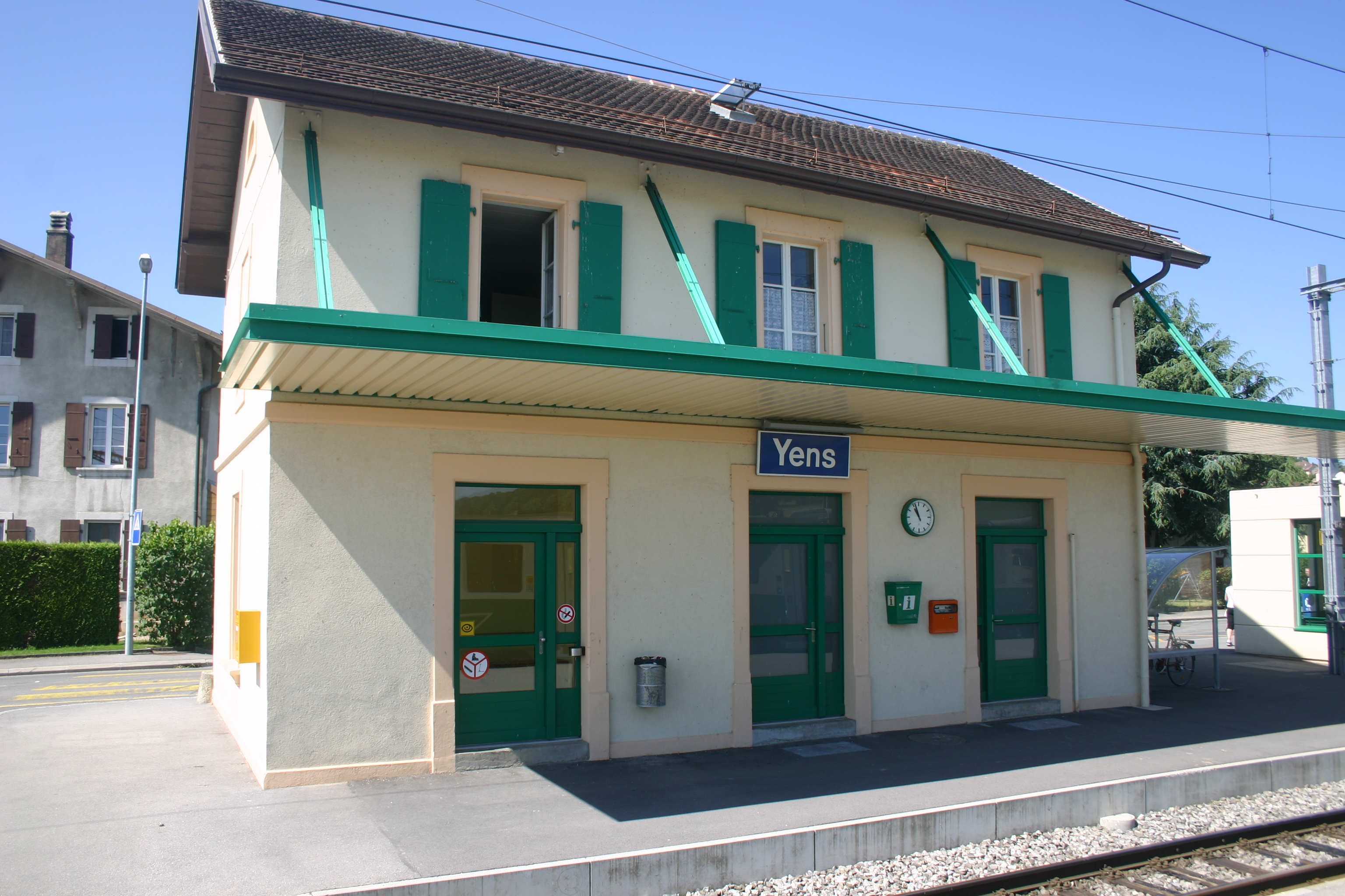 Gare de Yens